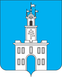 Герб австрійського періоду. В лазуровому полі срібна міська ратуша з брамою, посередині якої герб "Пилява".